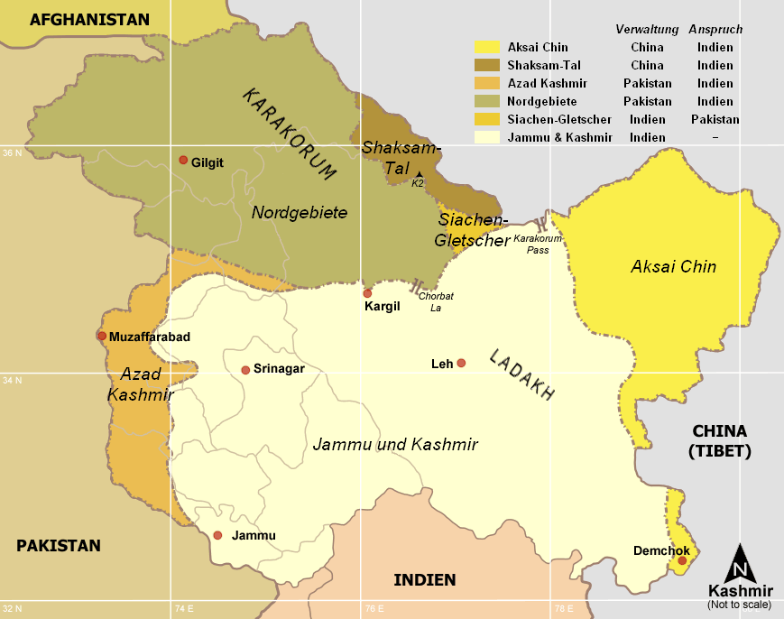 Kaschmir: umstrittene Gebiete und Gebietsansprüche (Indien, Pakistan, China) selbst erstellt auf Grundlage von Image:Map Kashmir Standoff 2003.png